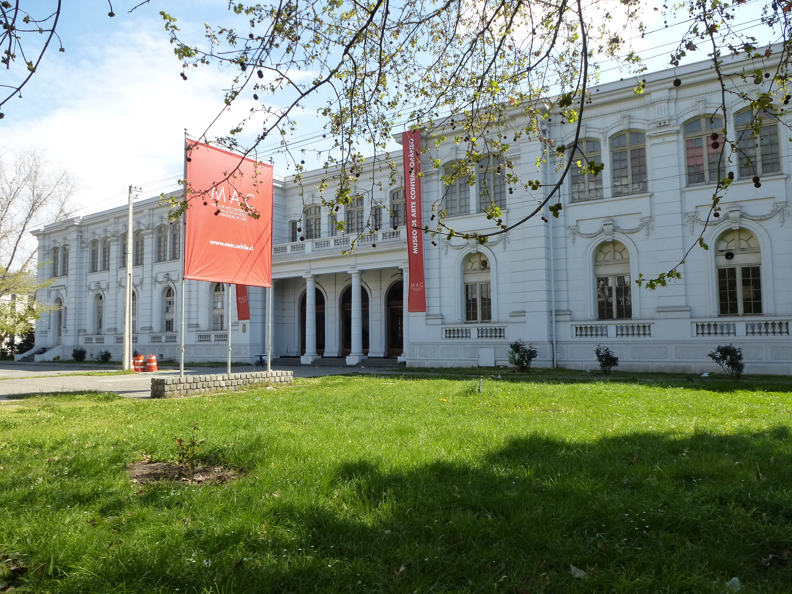 Consultorio Externo del Hospital San Juan de Dios This is a photo of a national monument in Chile: 1006